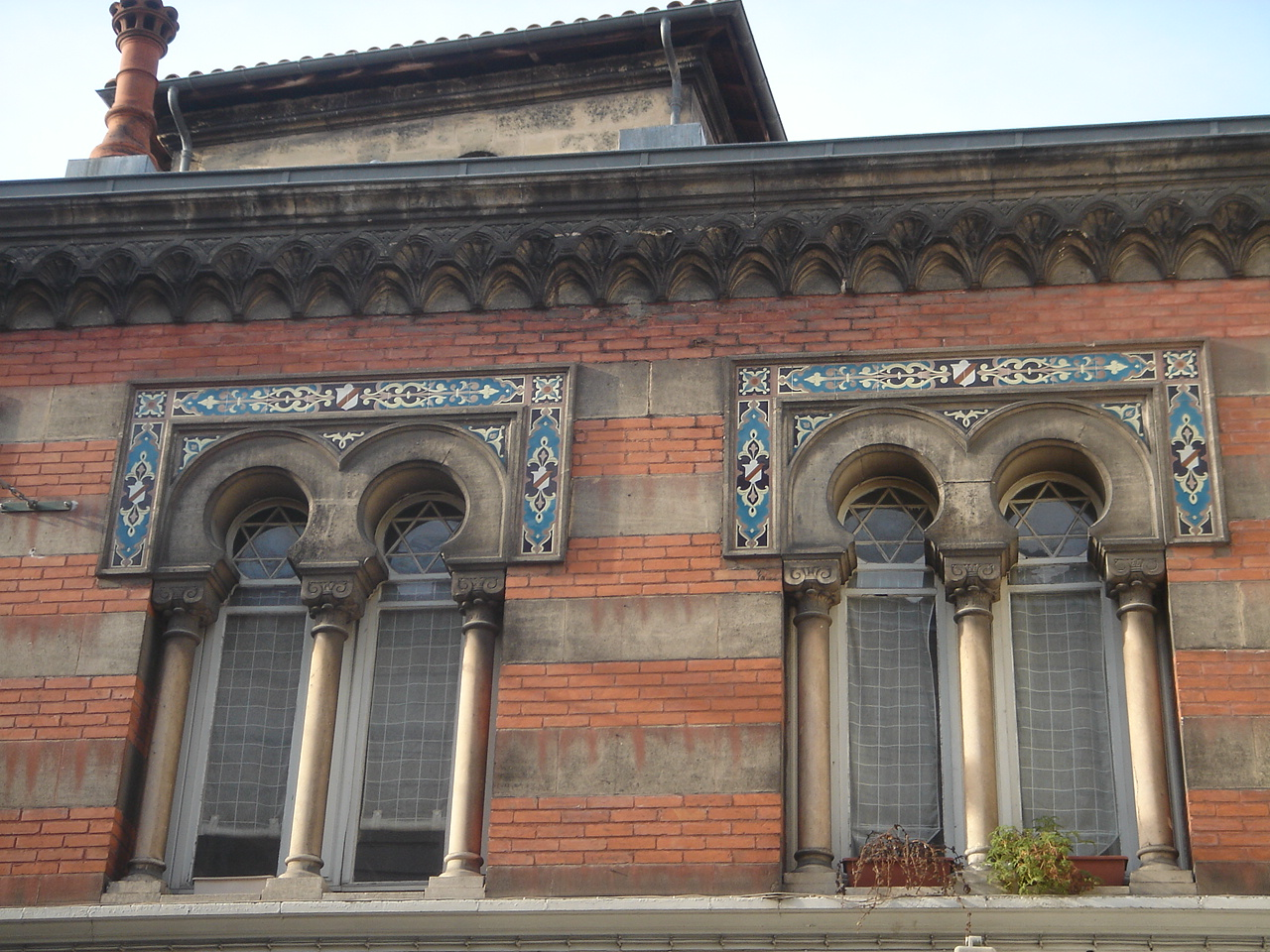 Immeuble d'habitation situé rue Notre Dame dans le quartier des Chartrons au nord du centre ville. On peut reconnaitre sur la façade des éléments de décoration mauresque et la fenêtre s'orne dans partie supérieure d'une étoile de David. Chargé depuis Wikipedia de.